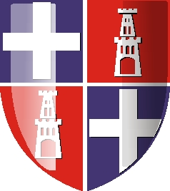 Stemma Torres Tennis Sassari 1903